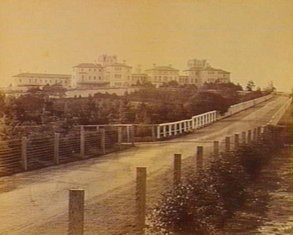 Aradale Mental Hospital, 1880